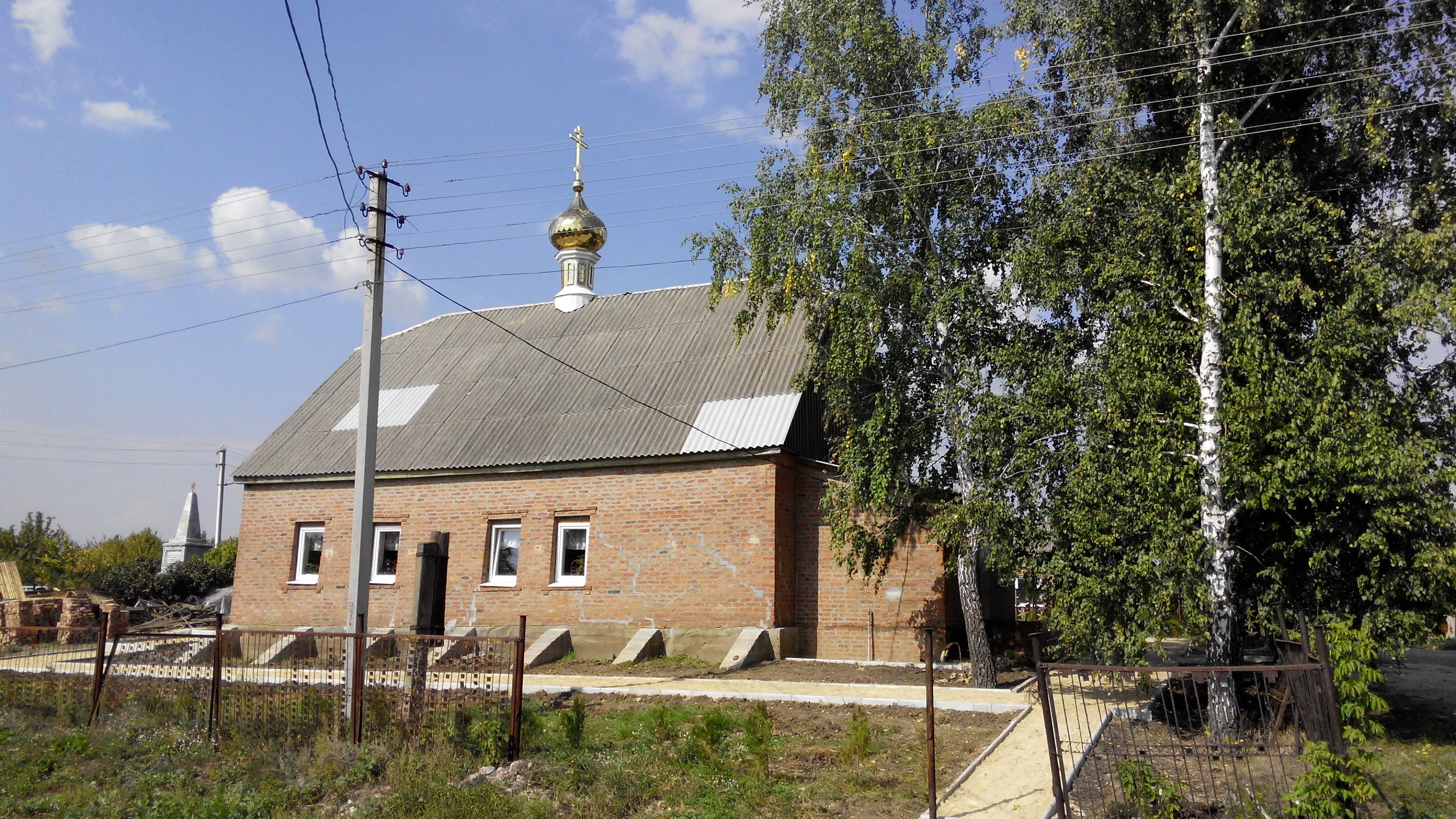 Україна. Харківська область. Зміївський район. Село Костянтівка. Різдвяно-Богородицька церква. Освячена у 2014 року. 13 вересня.